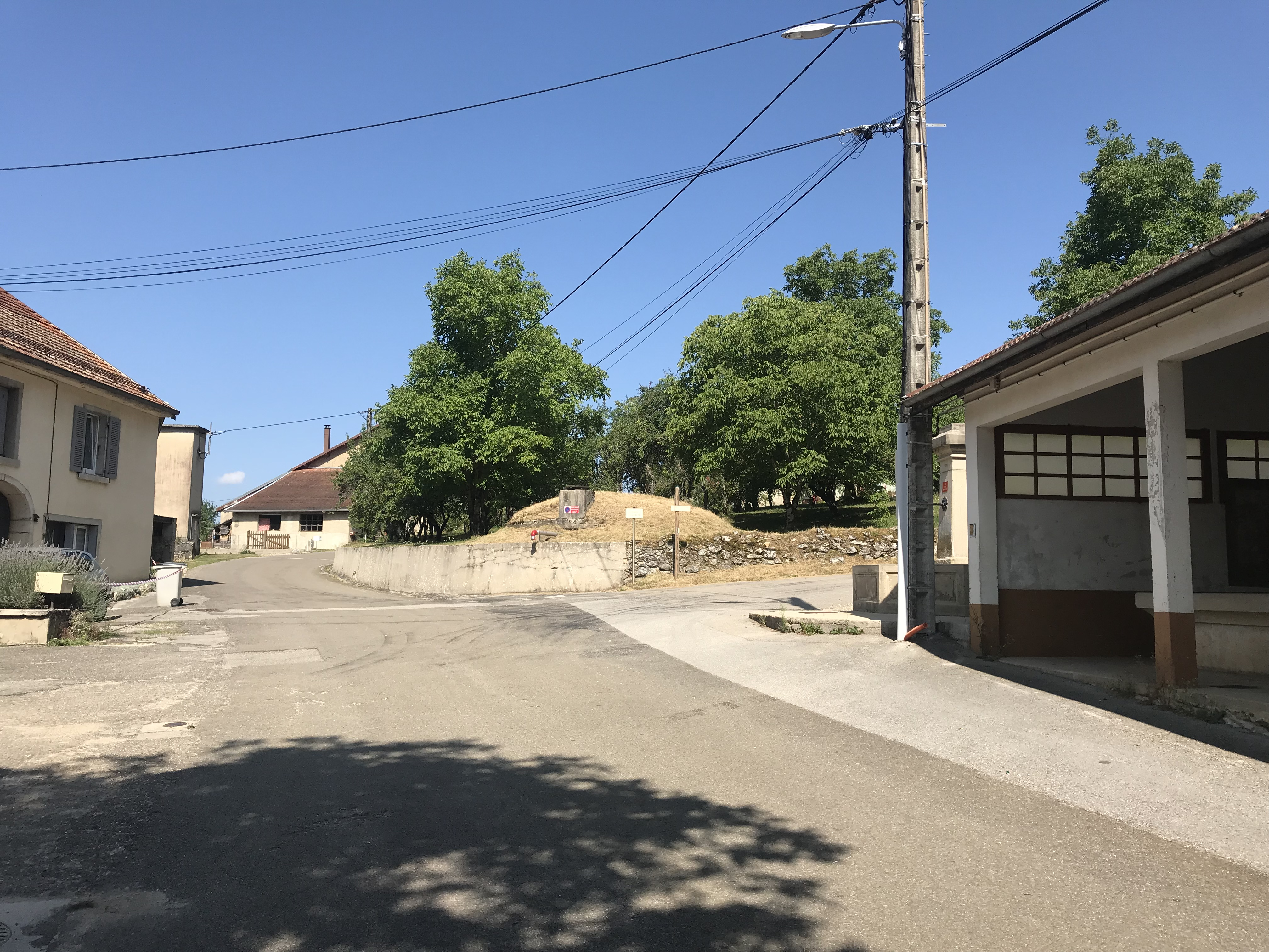 Image de Crenans, Jura, France.